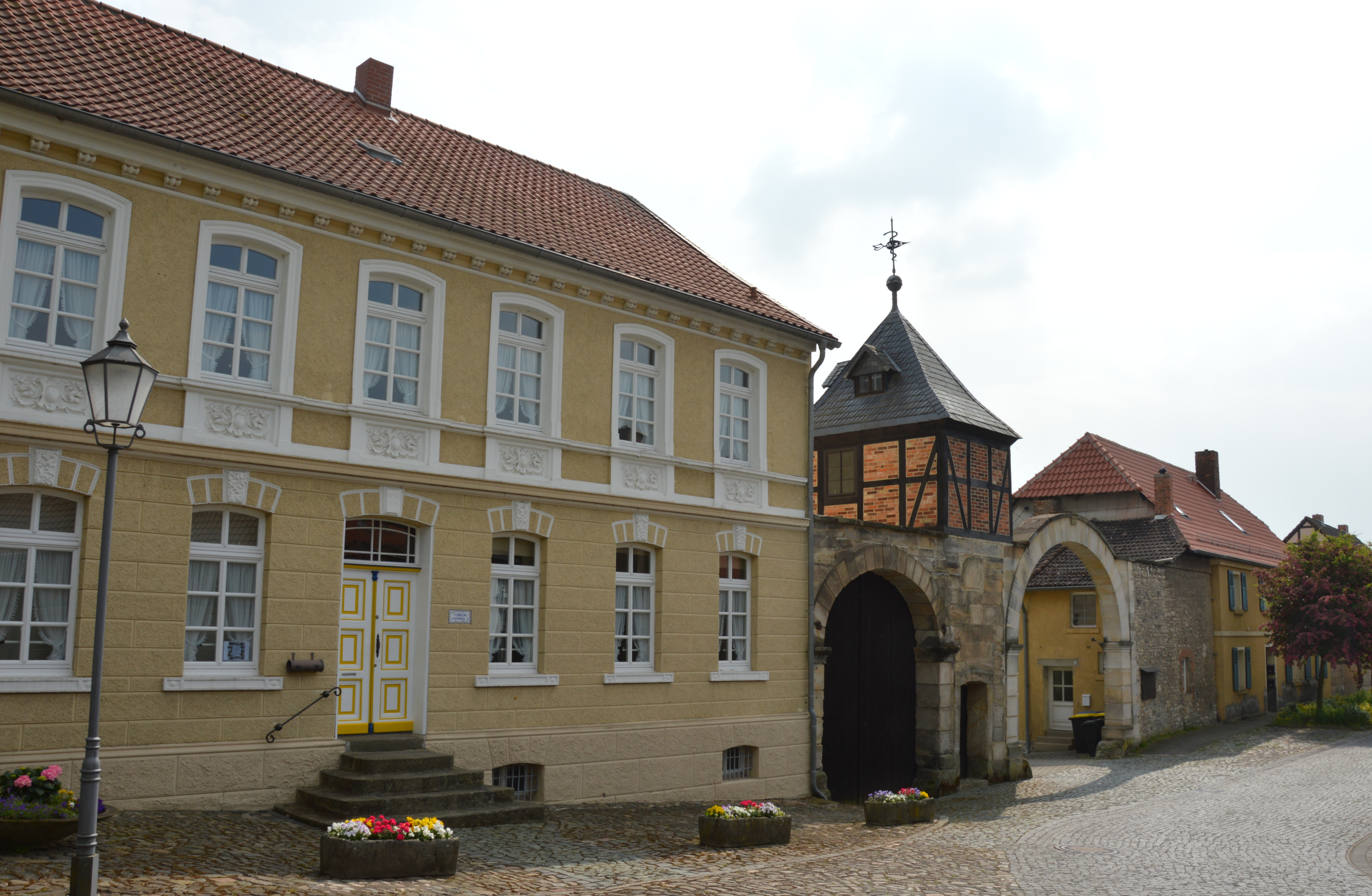 Haus Ackerwinkel 2, 3 in Hötensleben